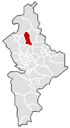 Localización del municipio de Sabinas Hidalgo, en el estado de Nuevo León, México.